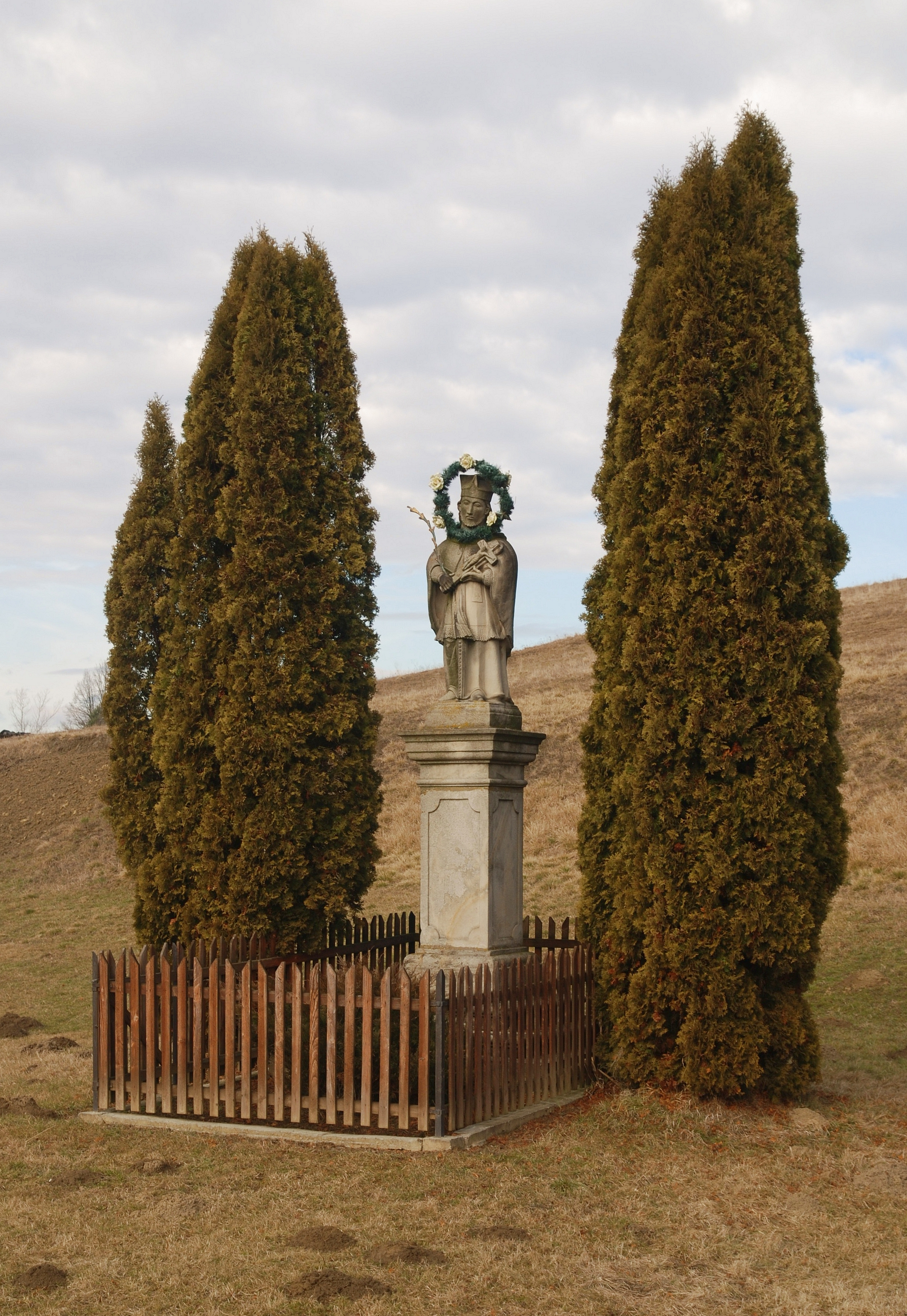 Kamienna figura św. Jana Nepomucena z 1823 roku w Ołpinach